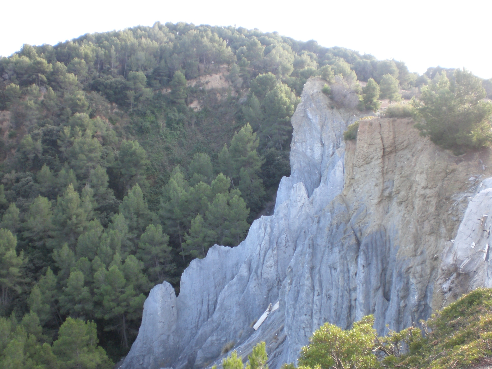 Ribes Blaves (febrer 2011)